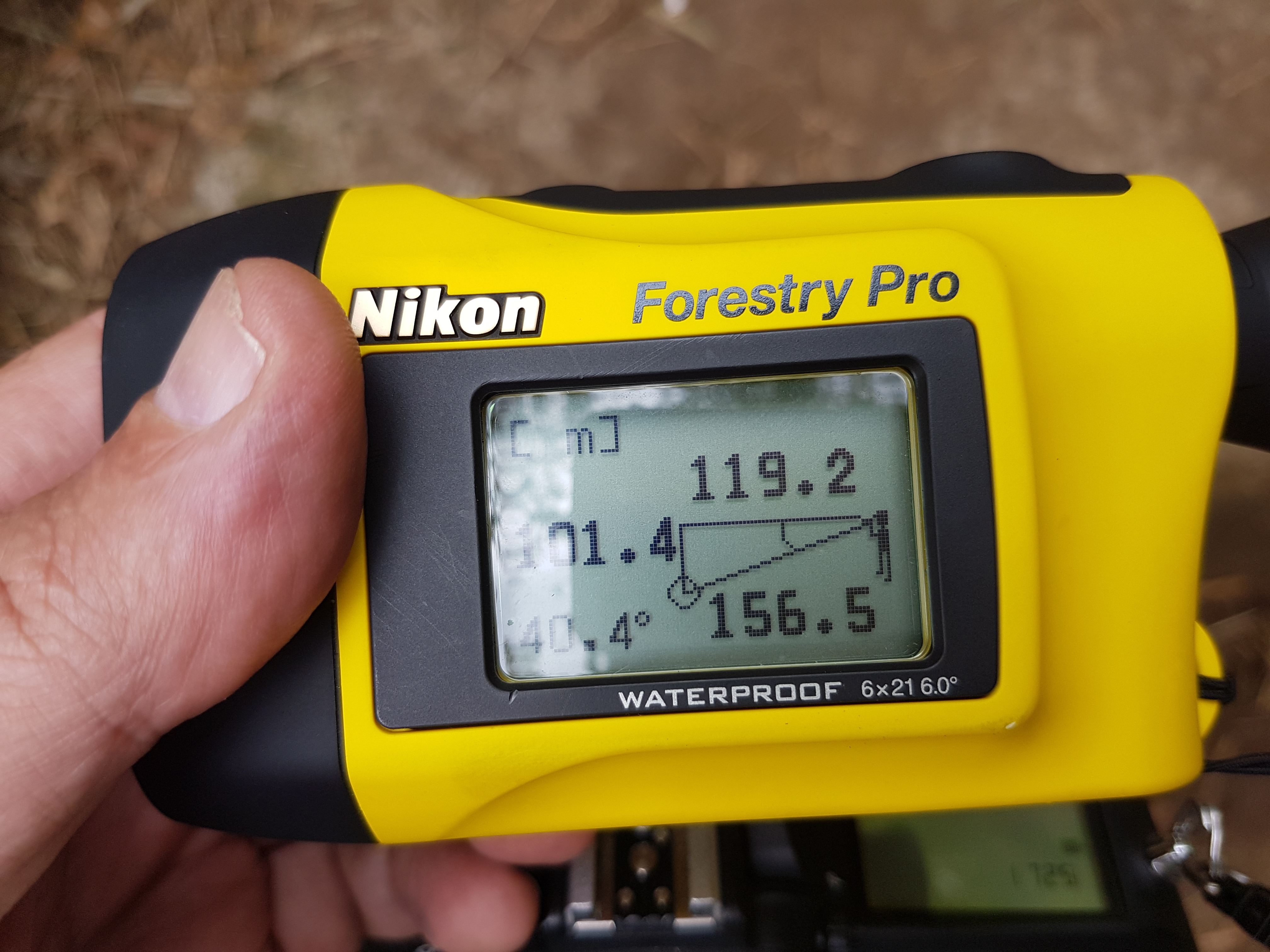 Altura aferida com telêmetro à laser.